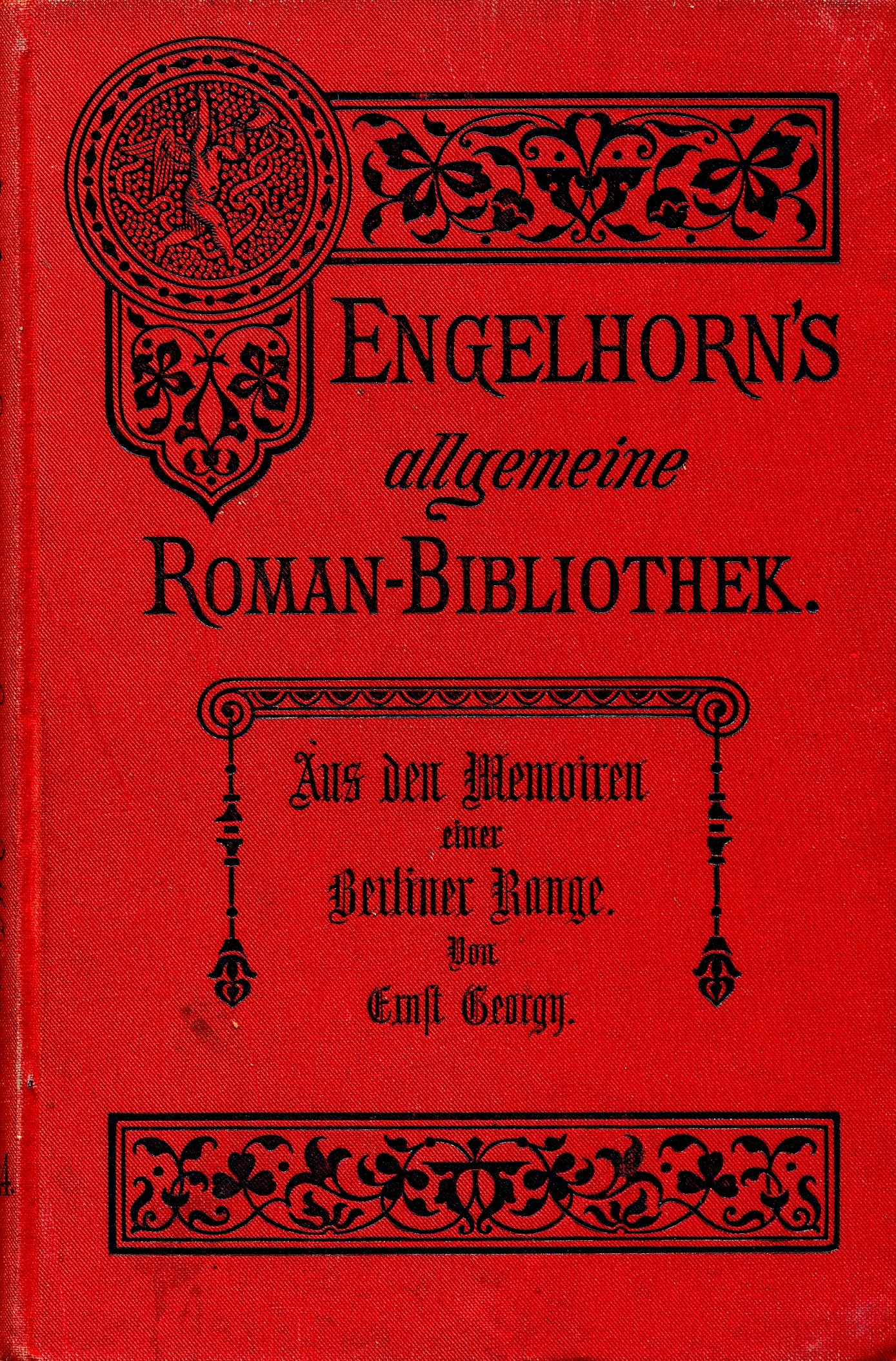 Leinen-Einband eines Buches aus Engelhorns allgemeiner Romanbibliothek